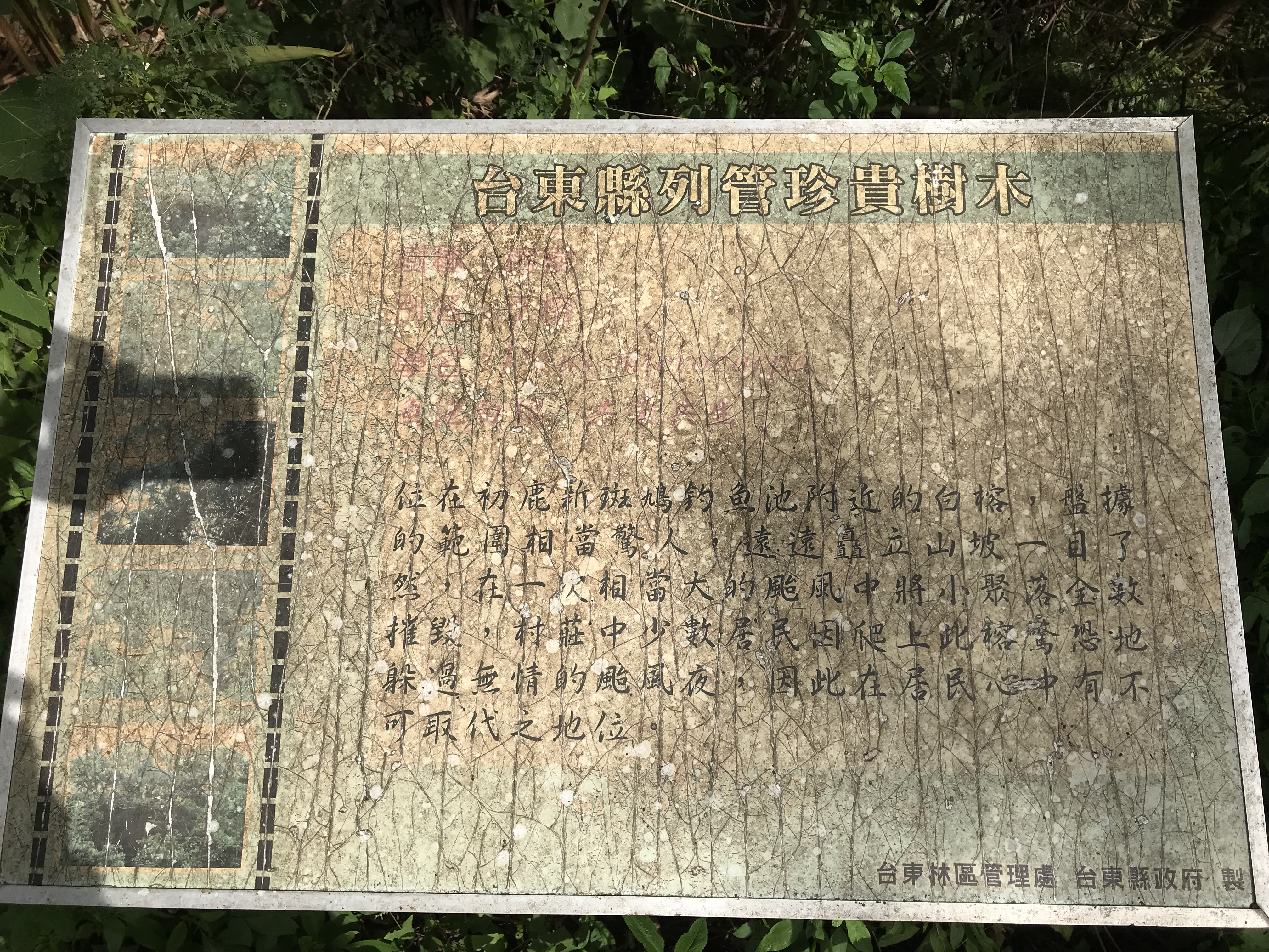 臺灣臺東縣卑南鄉斑鳩魚池白榕解說牌